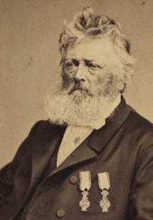 Ejer af Ålholm (grevskabet Christiansholm) 1838-1875 Owner of Ålholm, Denmark 1838-1875